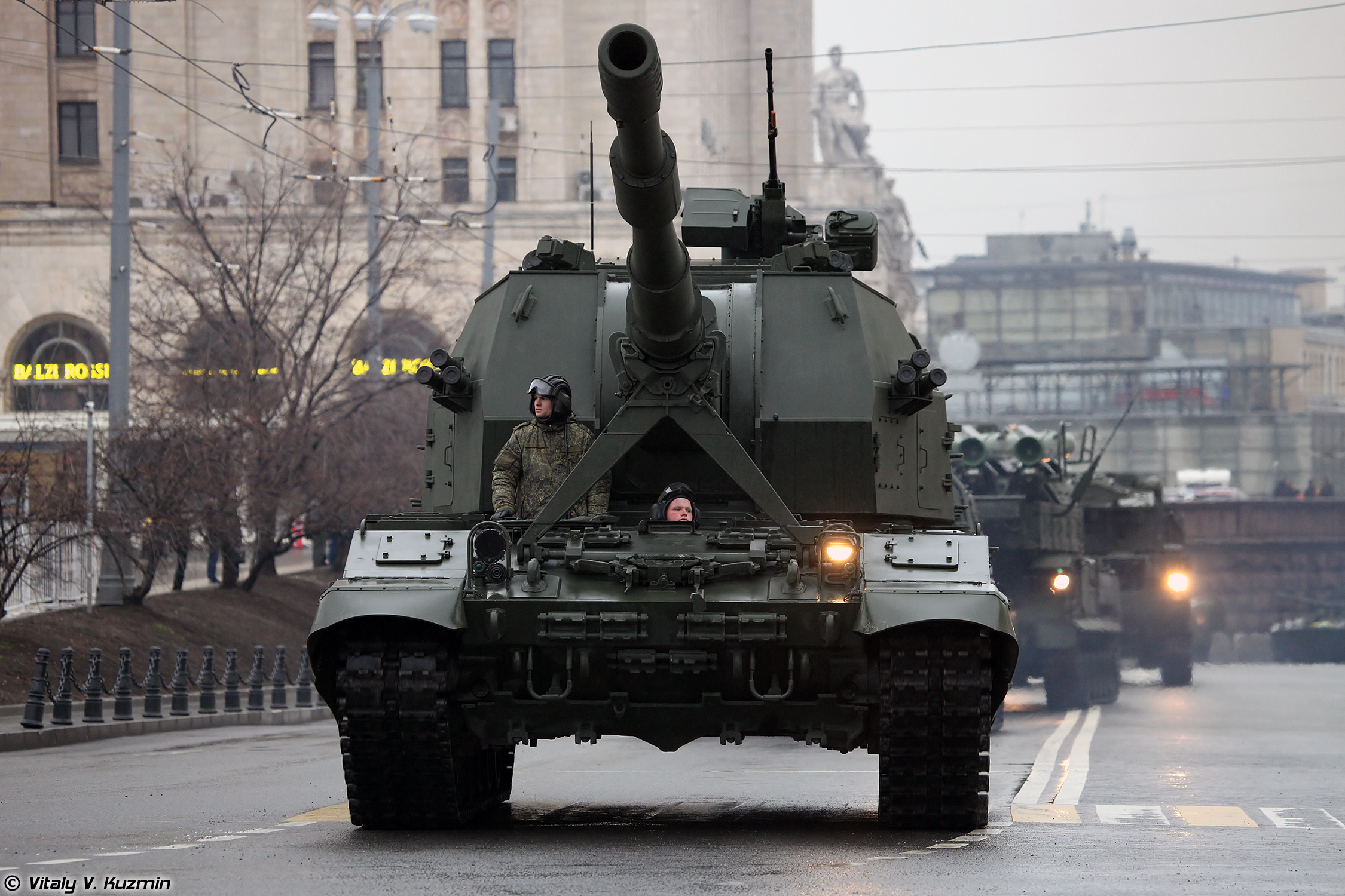 САУ 2С35 Коалиция-СВ (Self-propelled gun 2S35 Koalitsiya-SV)